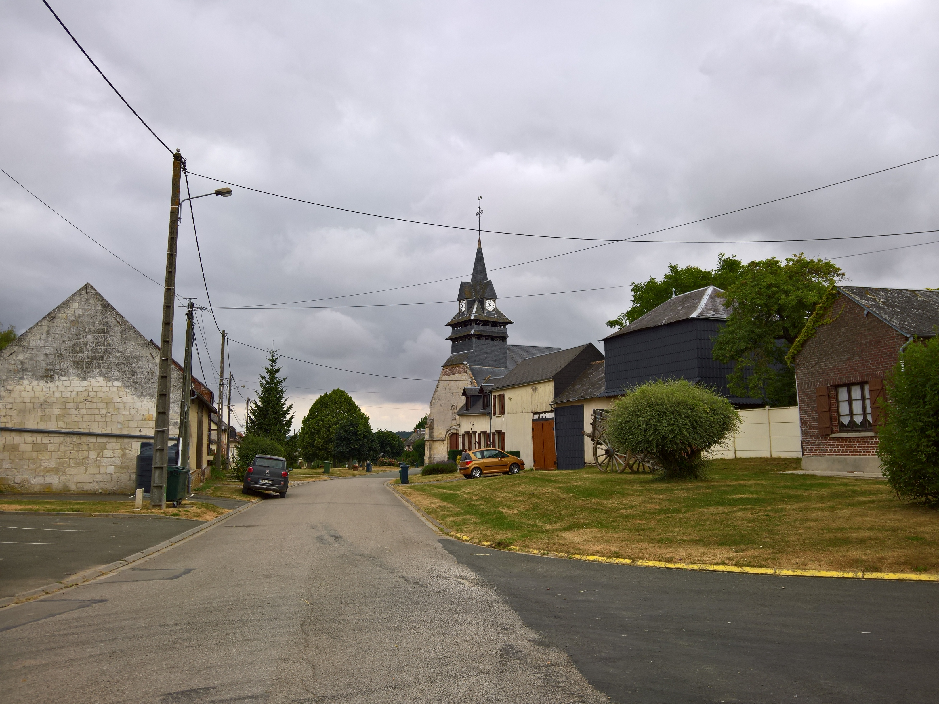 Cormeilles (Oise) : pâysage du village